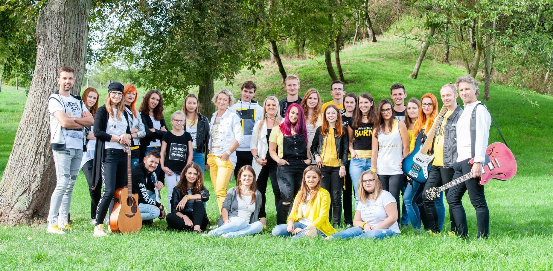 společná fotografie hudební skupiny GOOD WORK z roku 2018